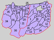 後の鳥取県気高郡域の町村制時点の町村。